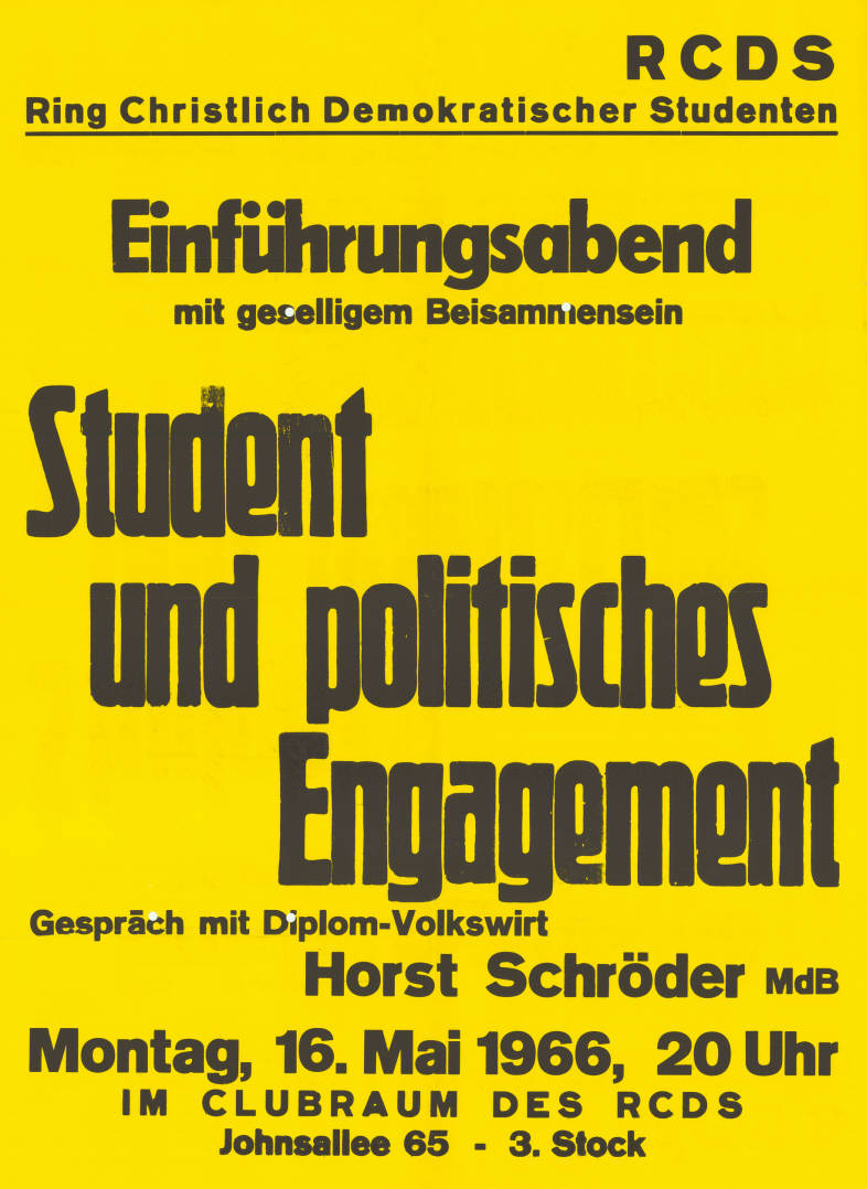 RCDS Ring Christlich Demokratischer Studenten Einführungsabend mit geselligem Beisammensein Student und politisches Engagement Gespräch mit Diplom-Volkswirt Horst Schröder MdB ... Plakatart: Ankündigungsplakat Auftraggeber: RCDS Objekt-Signatur: 10-029 : 252 Bestand: Plakate von Hochschulgruppen ( 10-029) GliederungBestand10-18: Plakate von Hochschulgruppen (10-029) » RCDS Lizenz: KAS/ACDP 10-029 : 252 CC-BY-SA 3.0 DE